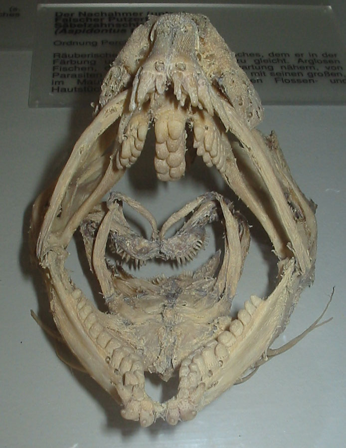 Schädel eines Seewolfs (Fisch)